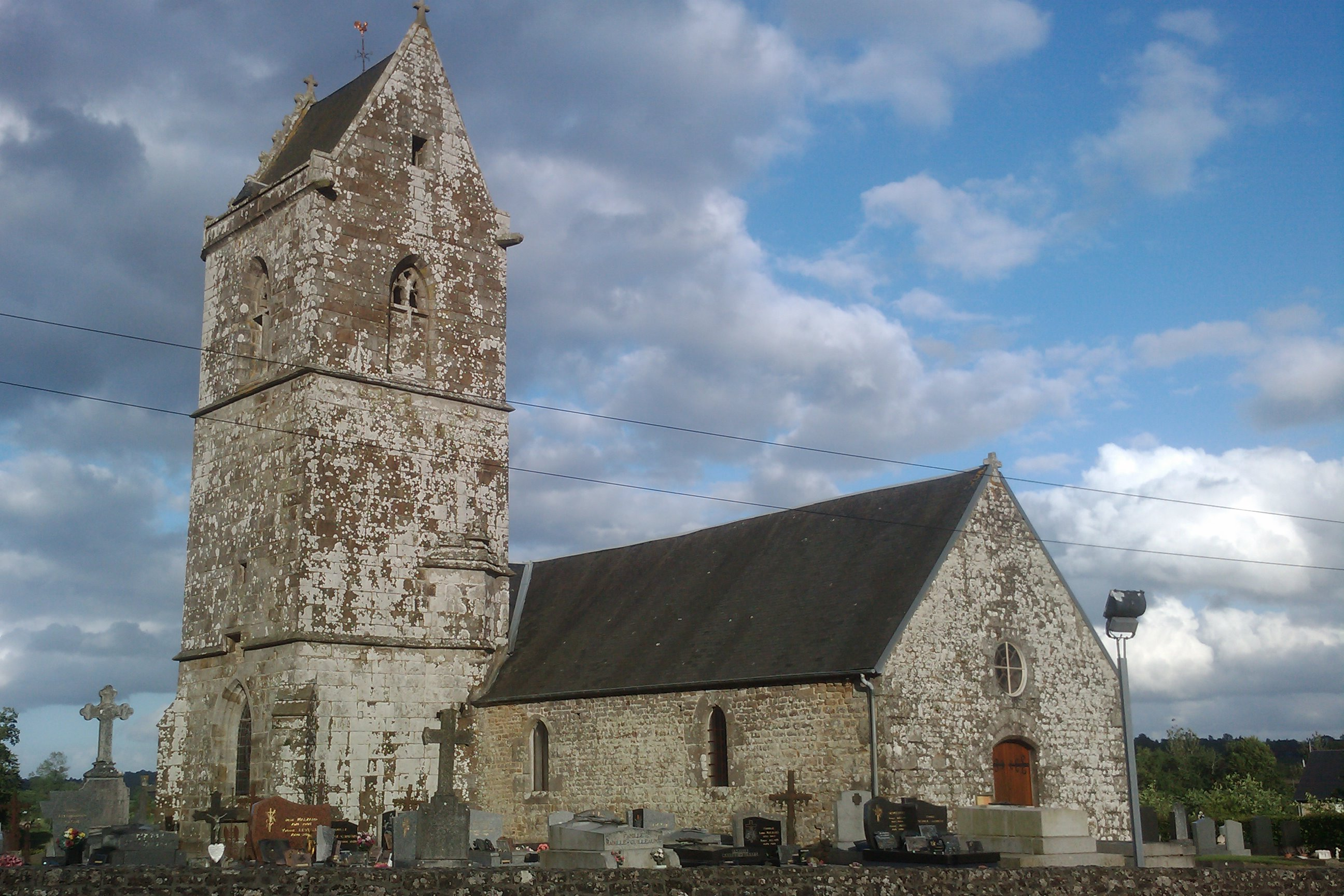 église Notre-Dame de Rouffigny